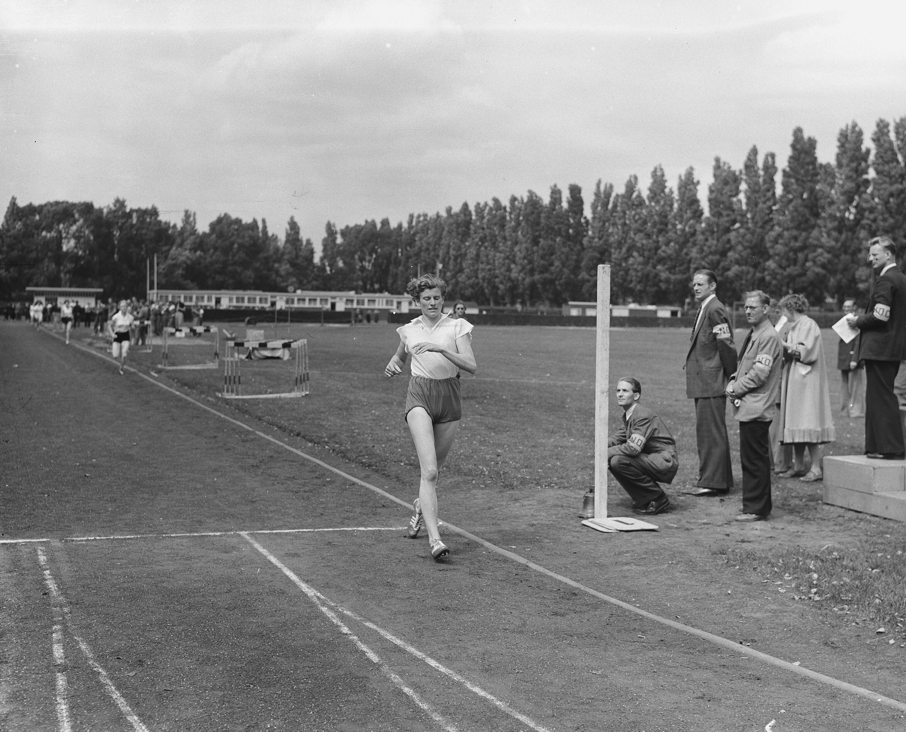 Collectie / Archief : Fotocollectie Anefo Reportage / Serie : [ onbekend ] Beschrijving : Nederlands Jeugdkampioenschappen Atletiek. Gre de Jong gaat door de finish (Sagitta) 800m nieuw record Datum : 12 juli 1953 Locatie : Amsterdam, Noord-Holland Trefwoorden : RECORDS, atletiek, finishen Persoonsnaam : Gre de Jong, Sagitta Instellingsnaam : Sintelbaan Fotograaf : Duinen, […] van / Anefo Auteursrechthebbende : Nationaal Archief Materiaalsoort : Glasnegatief Nummer archiefinventaris : bekijk toegang 2.24.01.09 Bestanddeelnummer : 905-8326